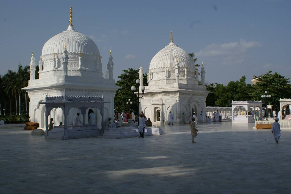 Dargaah-e-Hakimi in Burhanpur